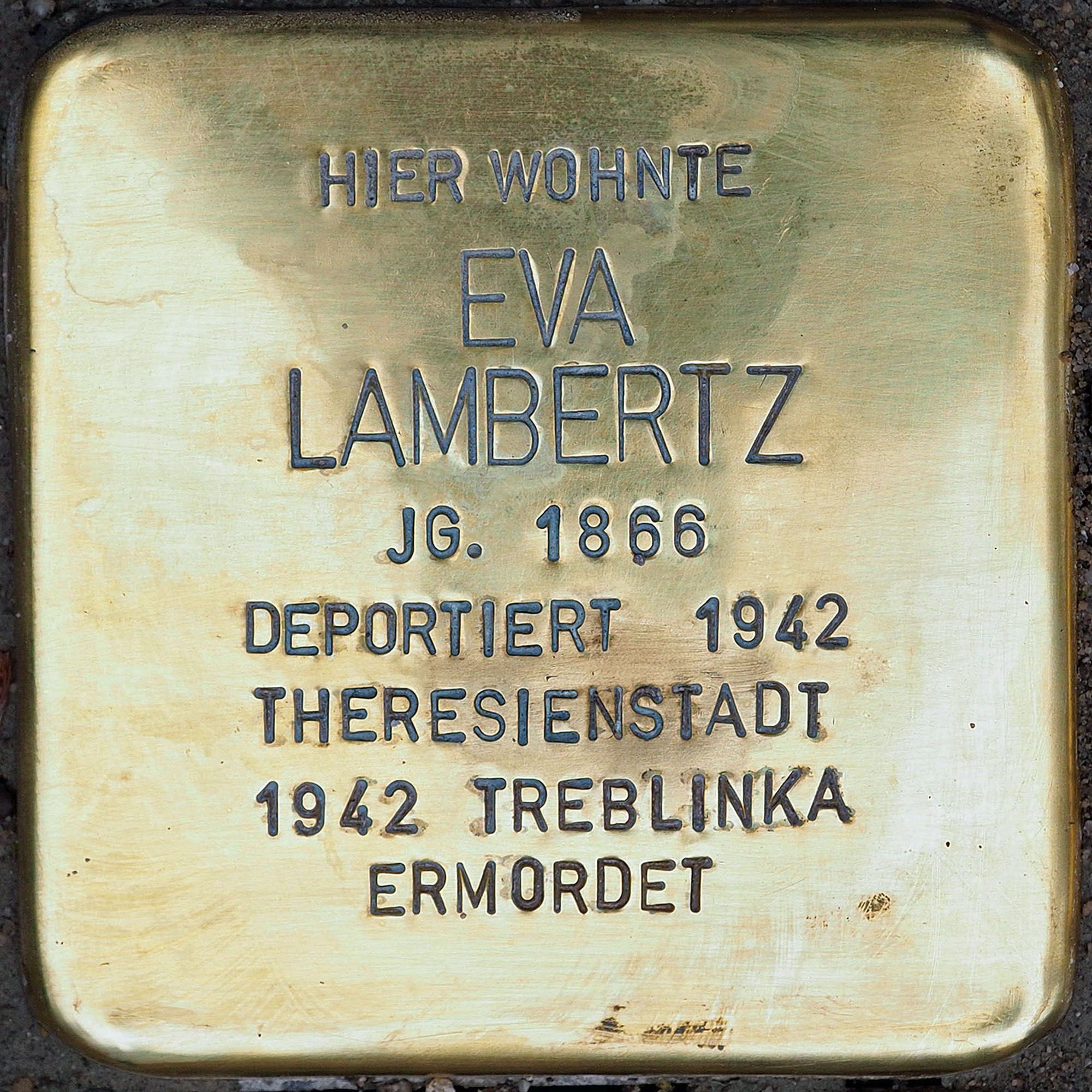 Stolpersteine in Kempen: Lambertz, Eva